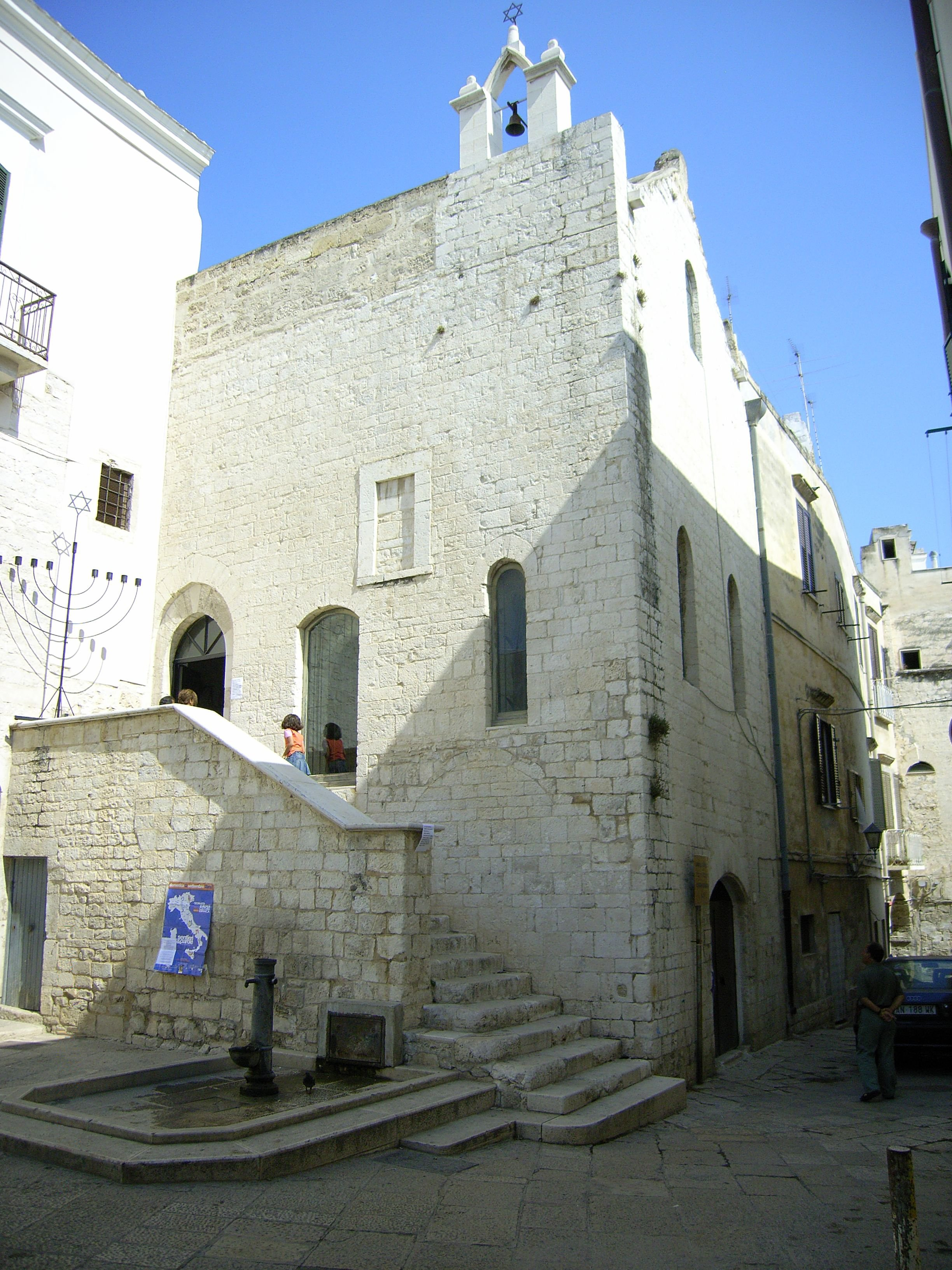 Scolanova Synagogue, Trani, Italy